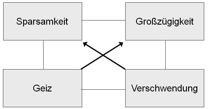 Urbeispiel des Wertequadrates von Helwig